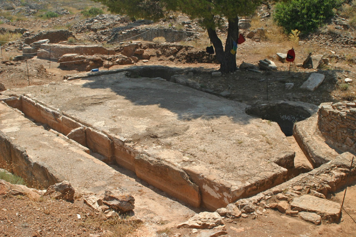 Waschanlage in den Silberminen von Laurion (Argileza)